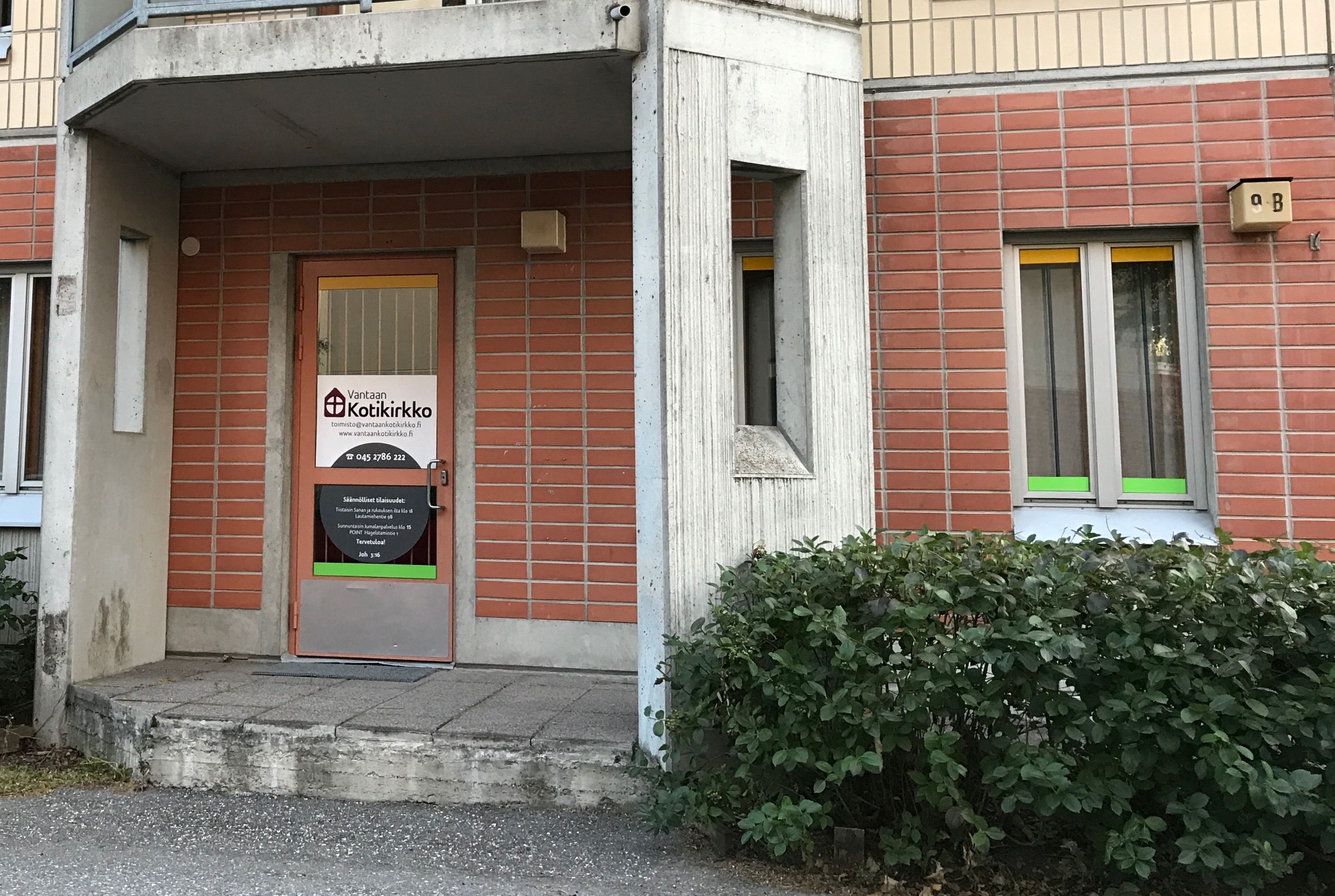 Vantaan Kotikirkon toimitilat Vantaan Lautamiehentiellä.